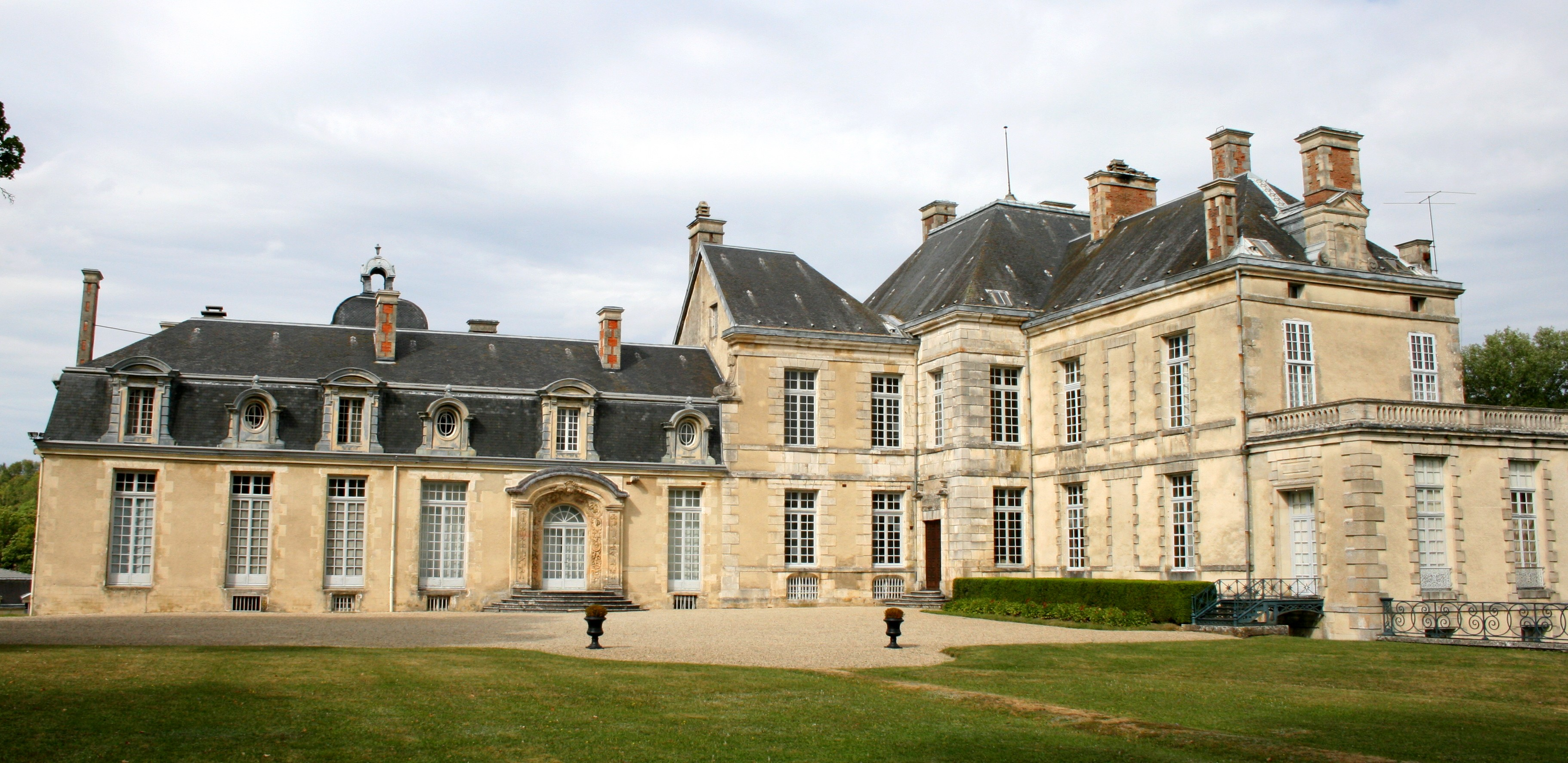 ce château a été habité par Voltaire et Mme du Châtelet entre 1734 et 1749